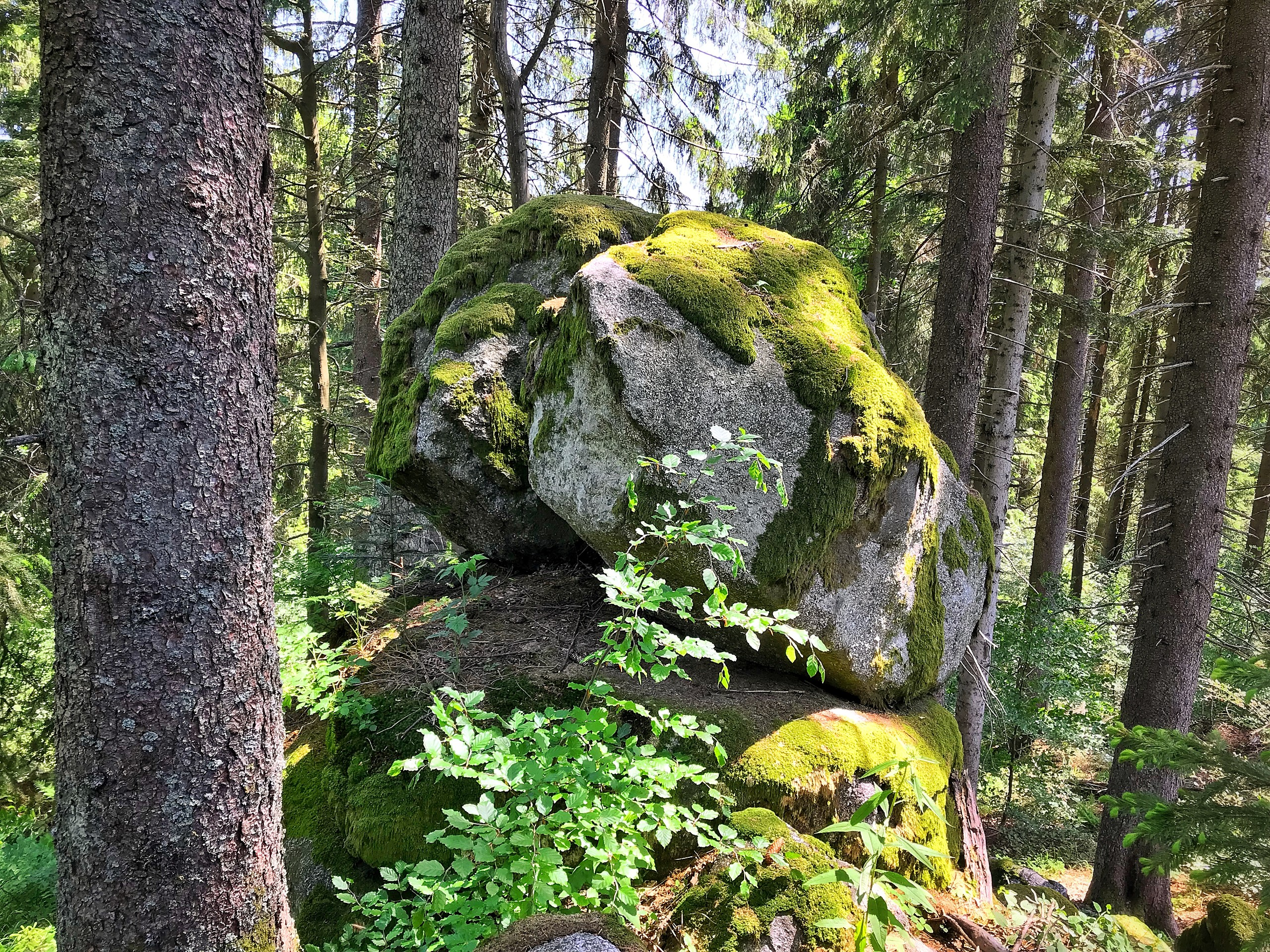 Vrchol Křemenné (1085) na Šumavě